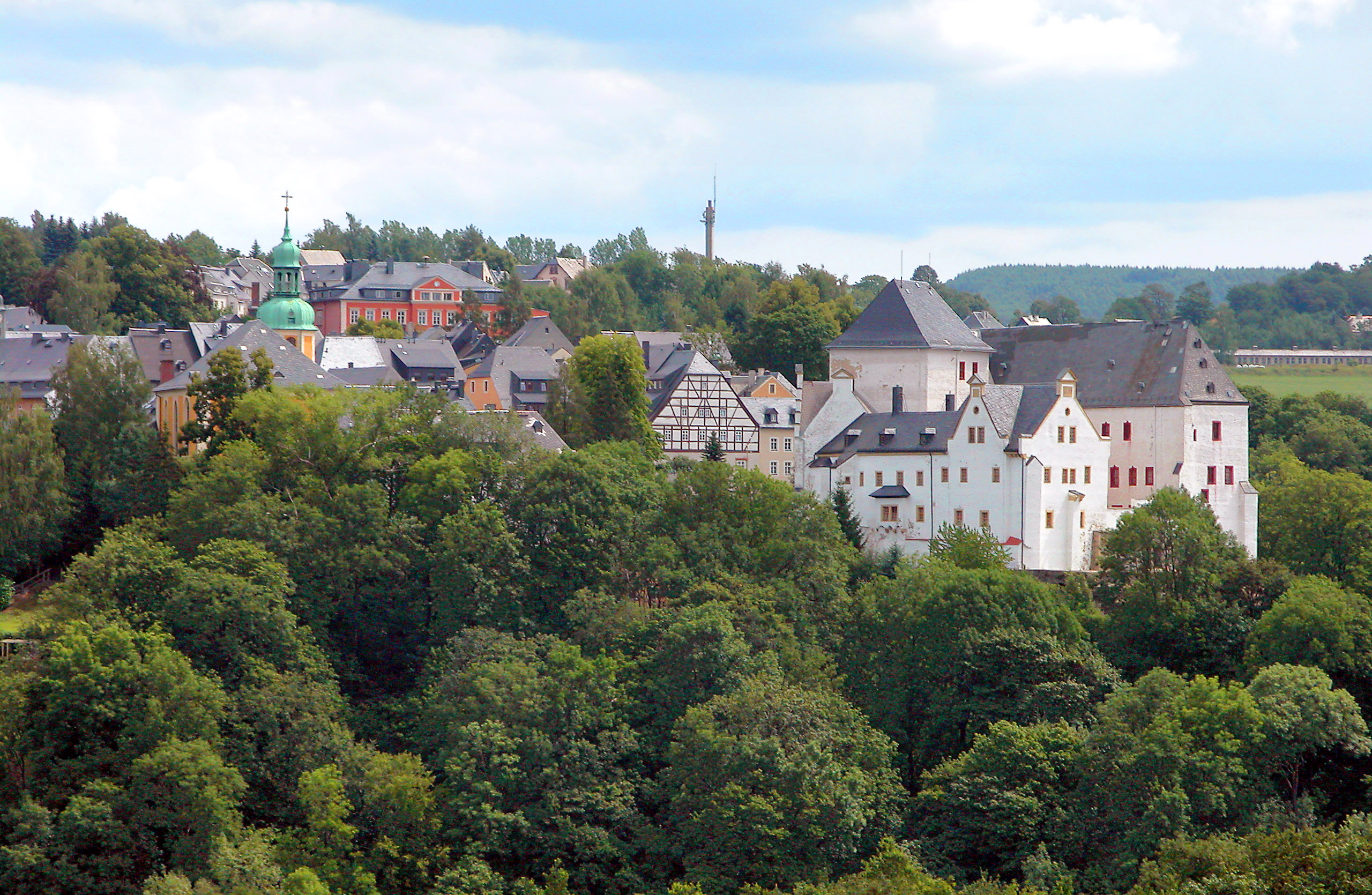 03.08.2006 09429 Wolkenstein: Stadt mit Kirche und Schloß (rechts, GMP: 50.654896,13.064900). Burg aus dem 12. Jh., ab 1505 zum Schloß ausgebaut, mehrfach umgebaut. In der DDR zu Wohnzwecken genutzt. Jetzt Museum. [DSCN10860.TIF]20060803145DR.JPG/Blobelt